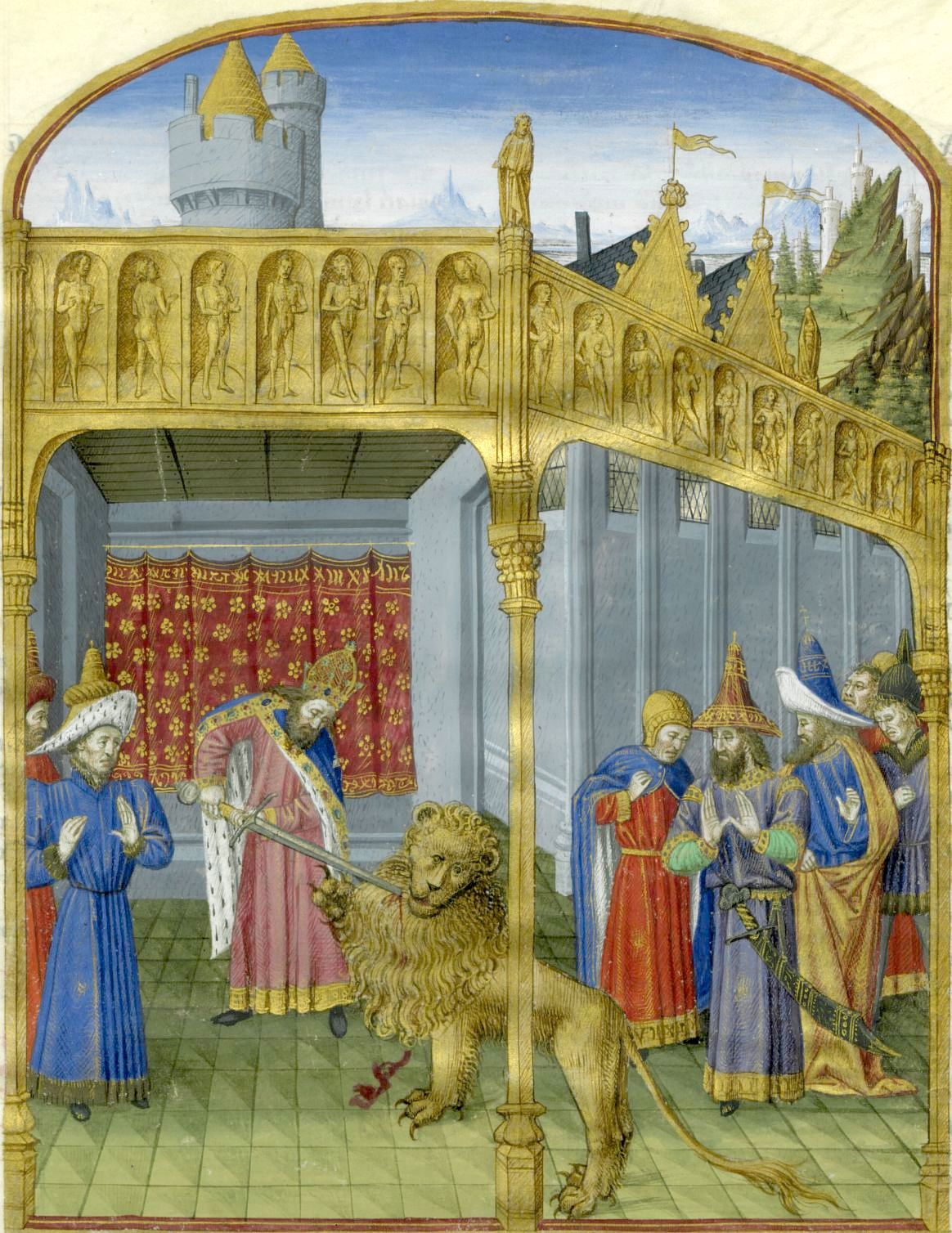 Mare Historiarum - BNF Lat4915 196r